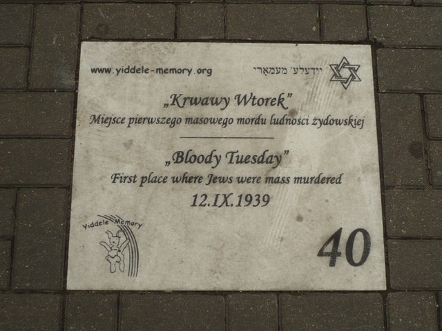 Radomsko. Otwarte Muzeum Żydowskie 40